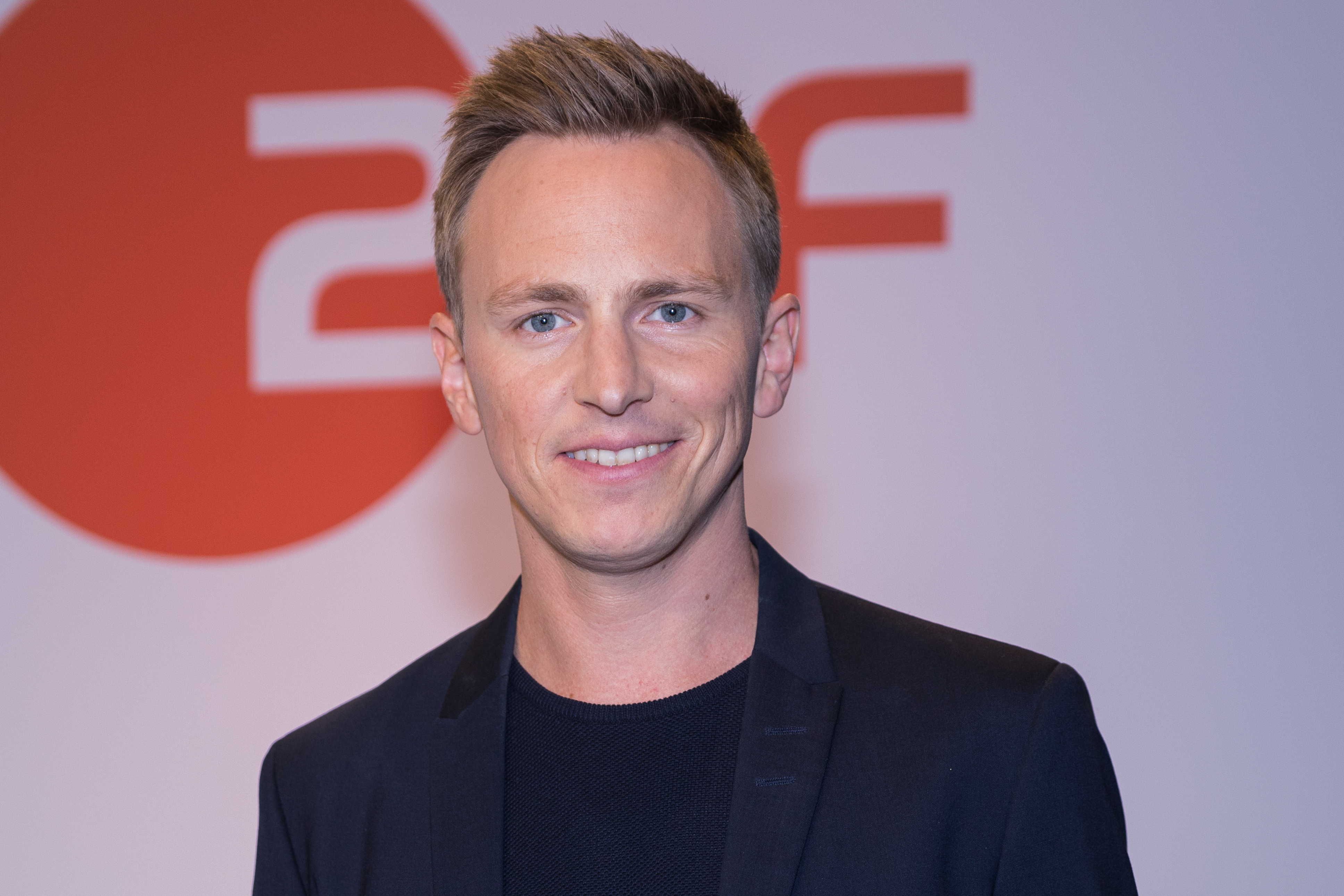 Jochen Breyer, ZDF-Moderator